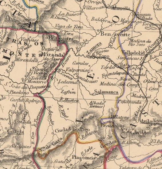 Detalle de las áreas zamorana y salmantina en el mapa "Spain and Portugal in provinces", realizado en 1838 por J. & C. Walker